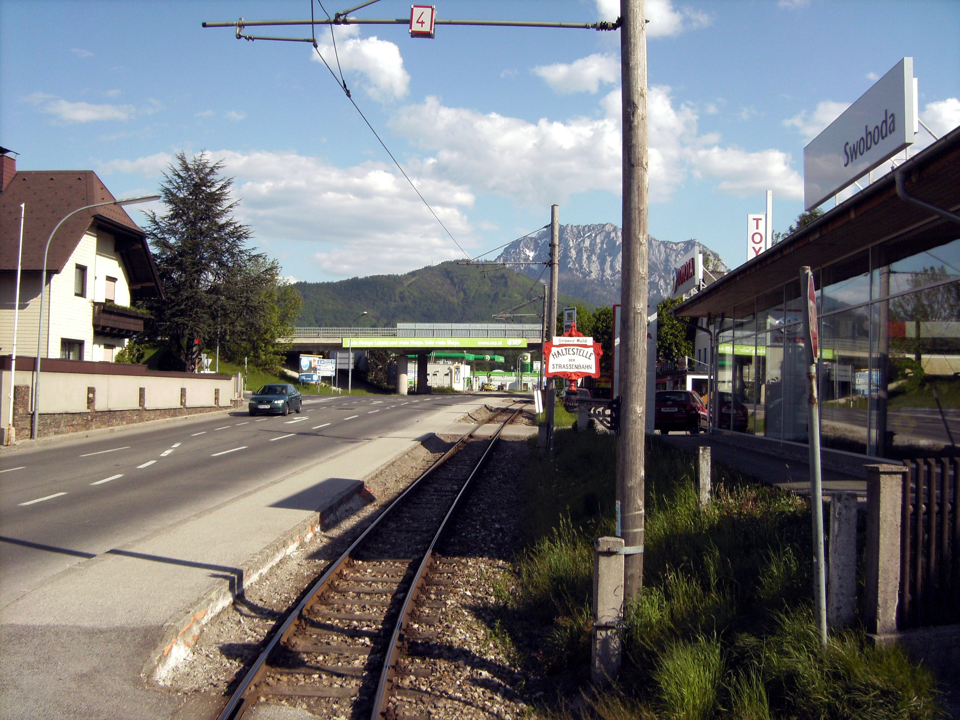 Haltestelle Grüner Wald der Gmundner Straßenbahn